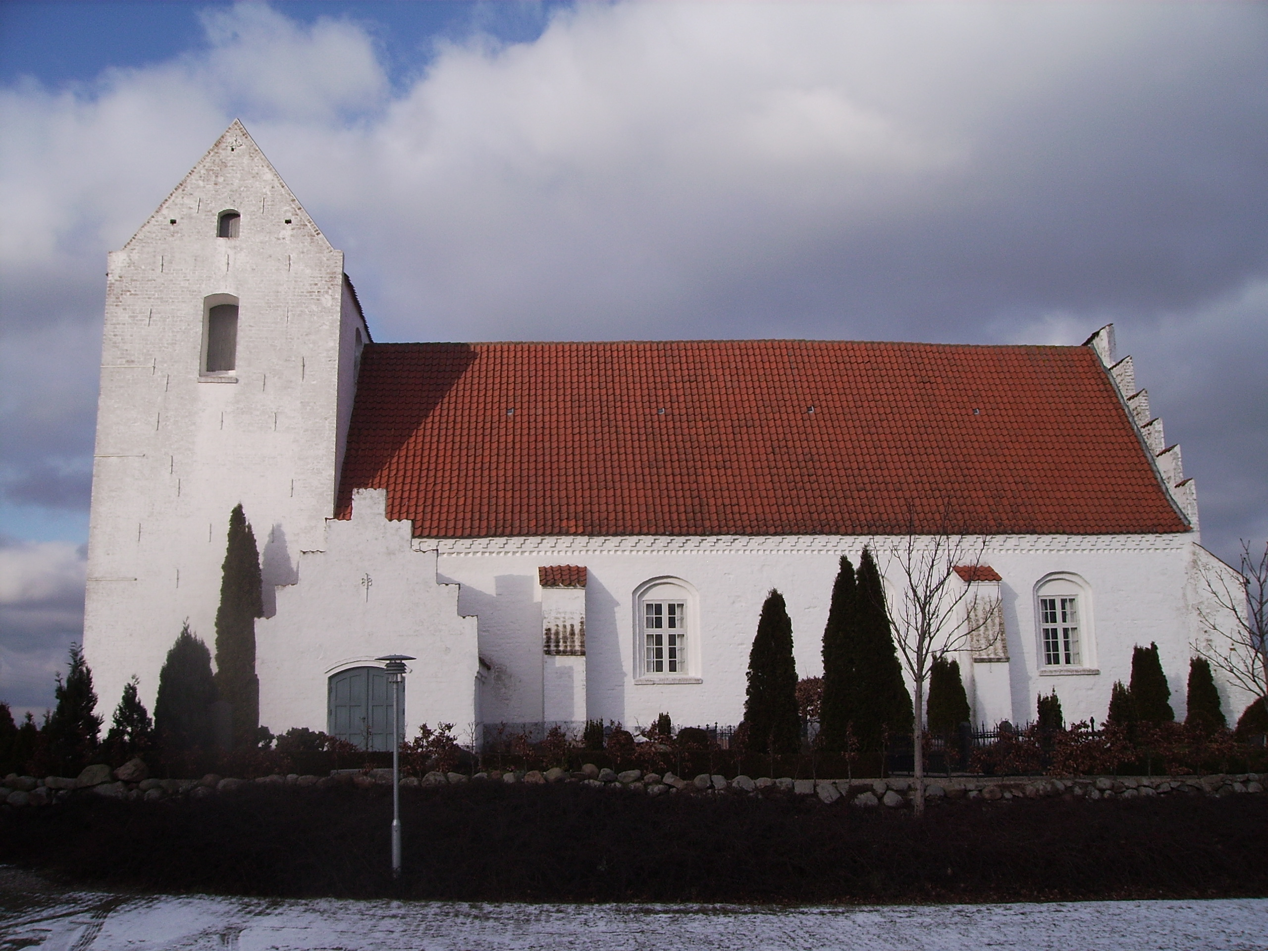 Brændekilde Kirke, Brændekilde Sogn, Odense Herred, Odense Amt, Denmark (Danish Church) - Brændekilde Kirke fra syd